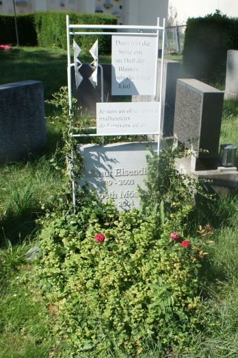 Feuerhalle Simmering-Helmut Eisendle